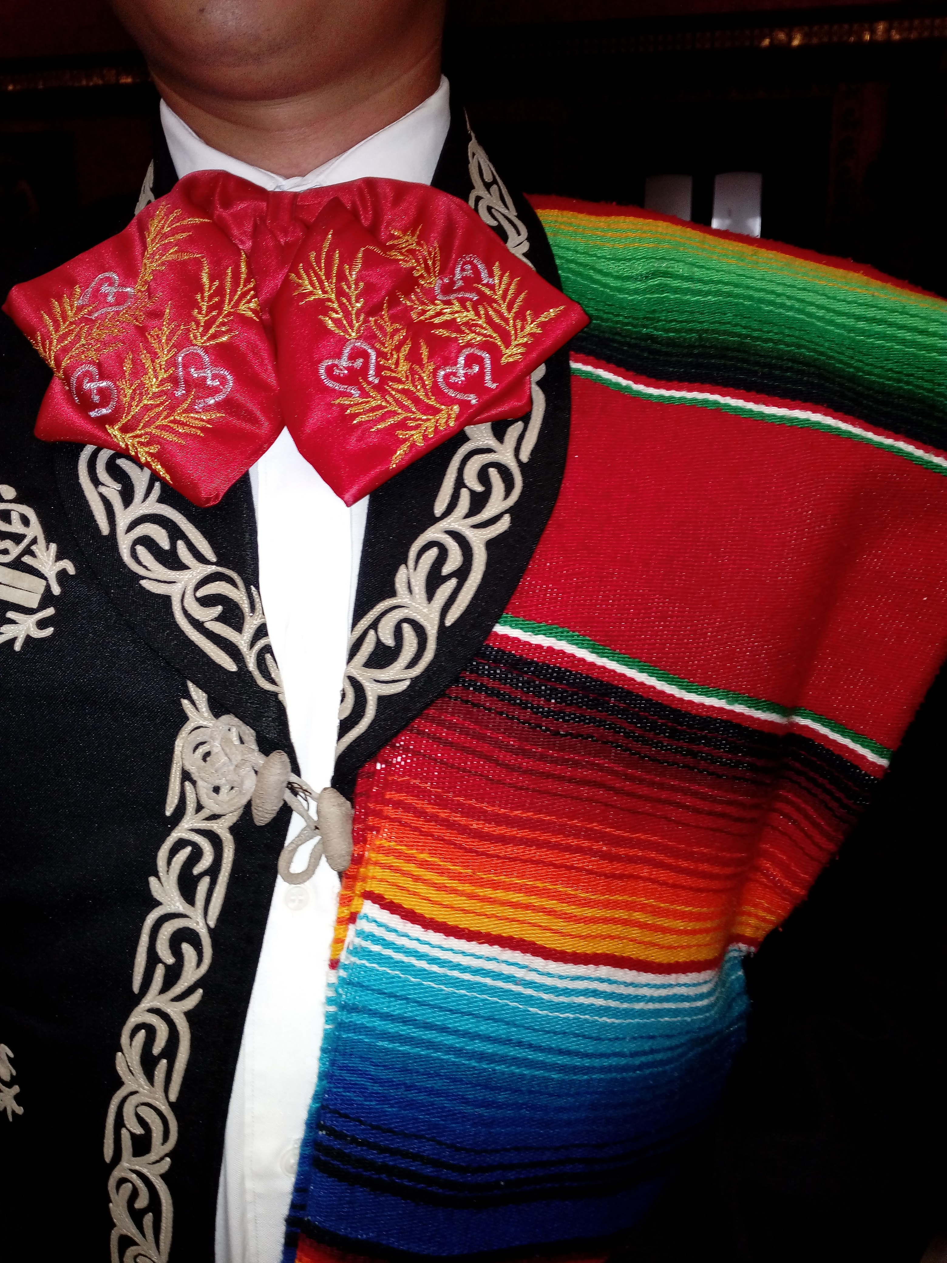 Detalle de un traje de charro de grecas con corbatín y sarape.